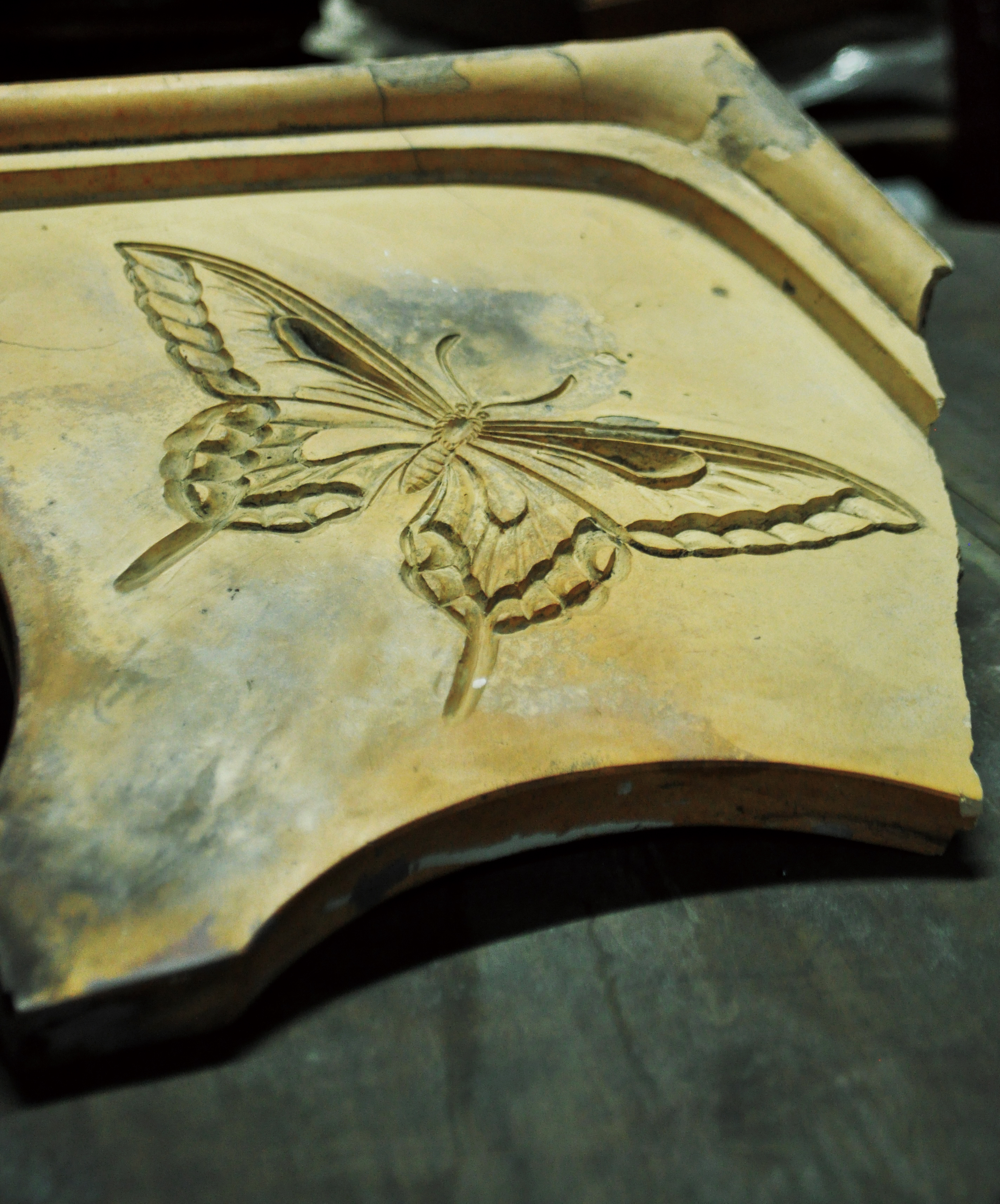 久田吉之助のテラコッタ。武田五一設計の名和記念昆虫館（岐阜）の屋根の鬼飾りとして掲げられていいたもの。アゲハチョウが彫刻されている。Luehdorfia japonica→Papilio